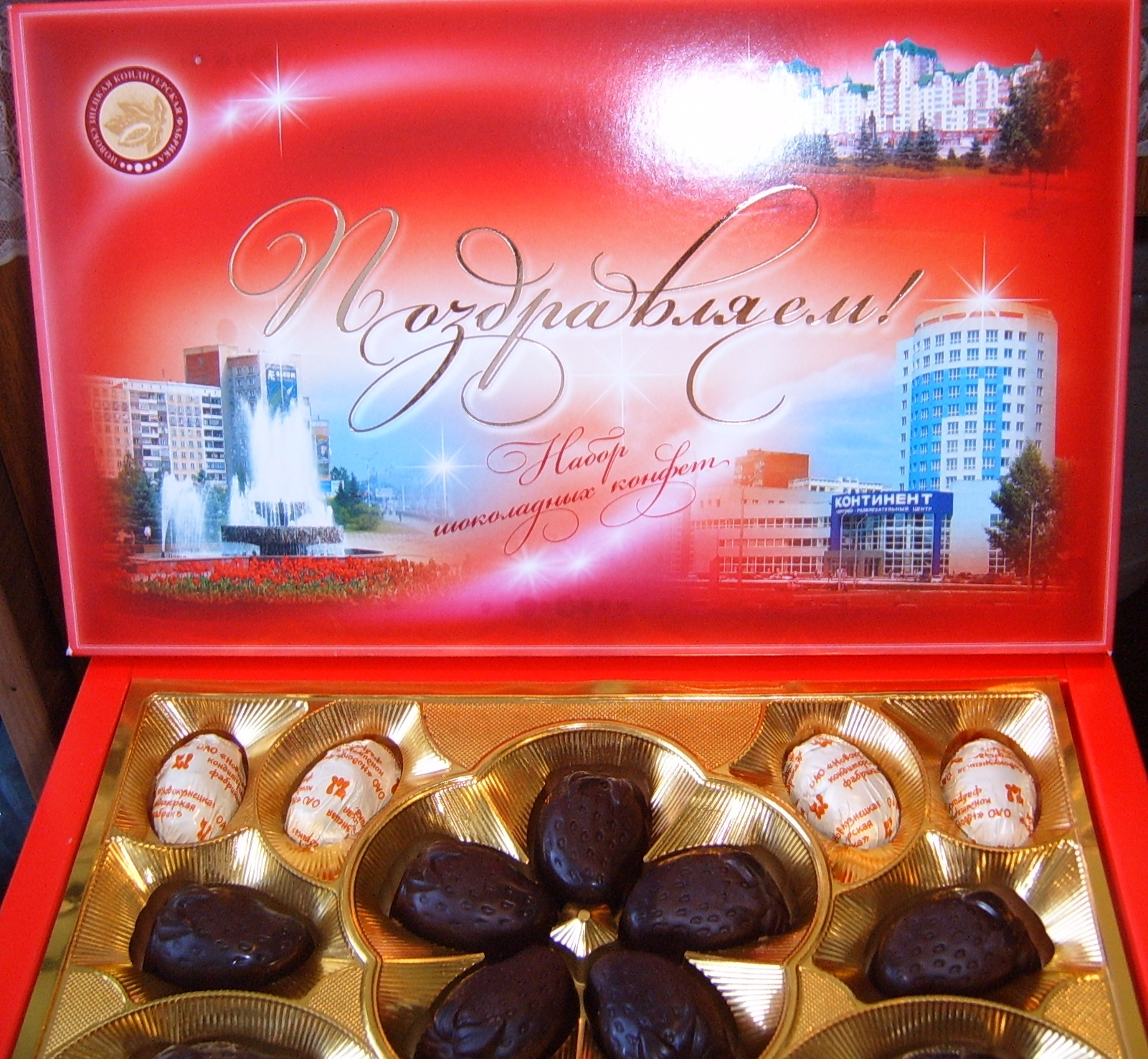 Набор конфет Поздравляем